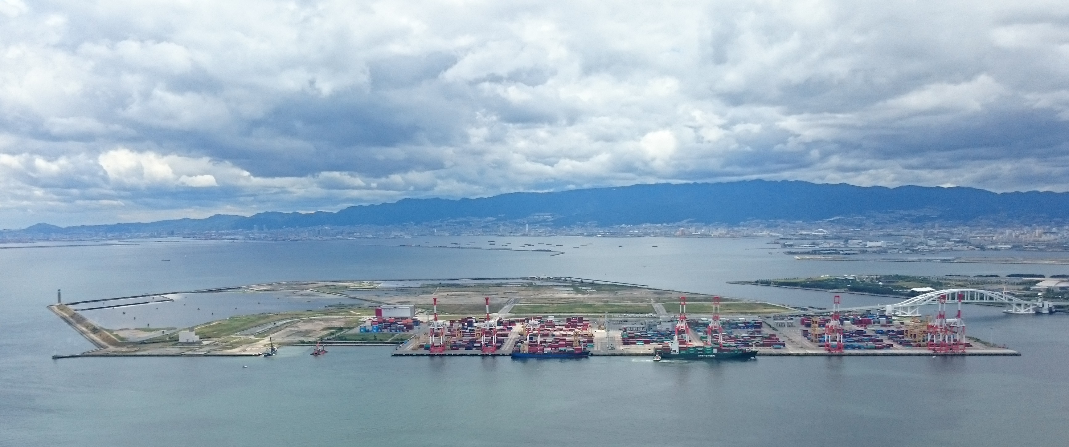 夢洲全景（大阪府咲洲庁舎より撮影）